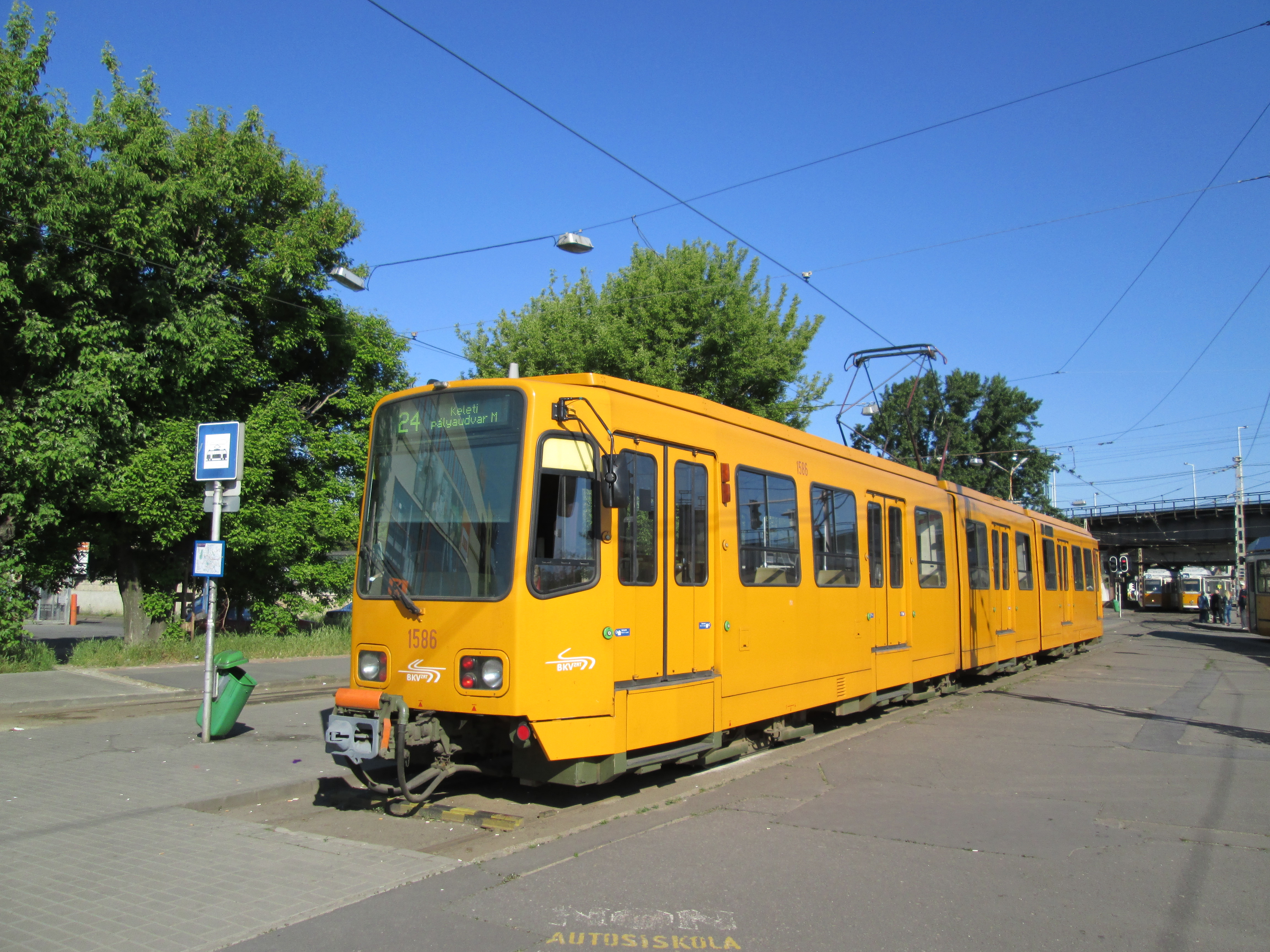 Az 1586-os pályaszámú Duewag TW6000-es típus a 24-es villamos közvágóhídi végállomásán (Budapest, IX. kerület)